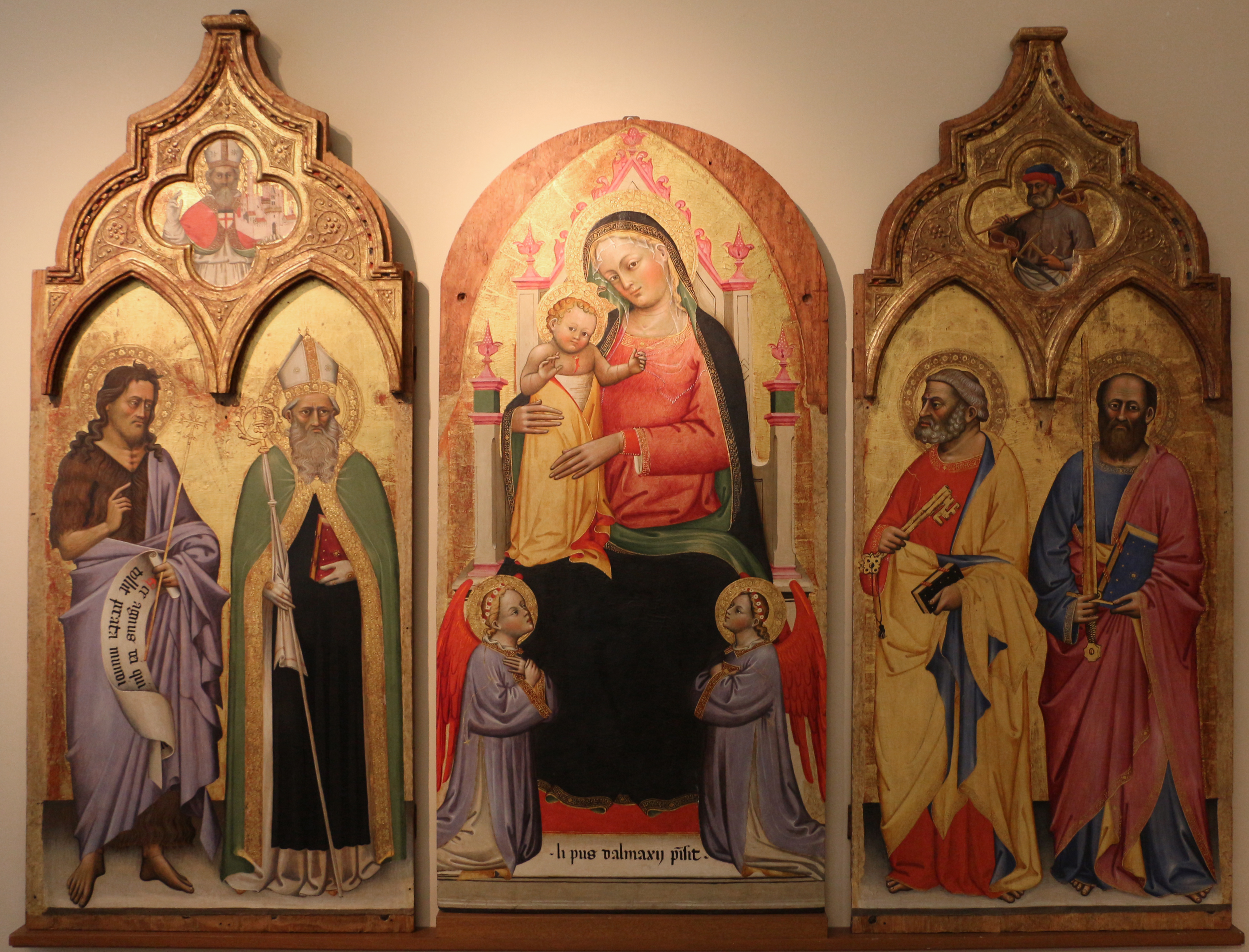 Pinacoteca Nazionale di Bologna This is a photo of a monument which is part of cultural heritage of Italy.